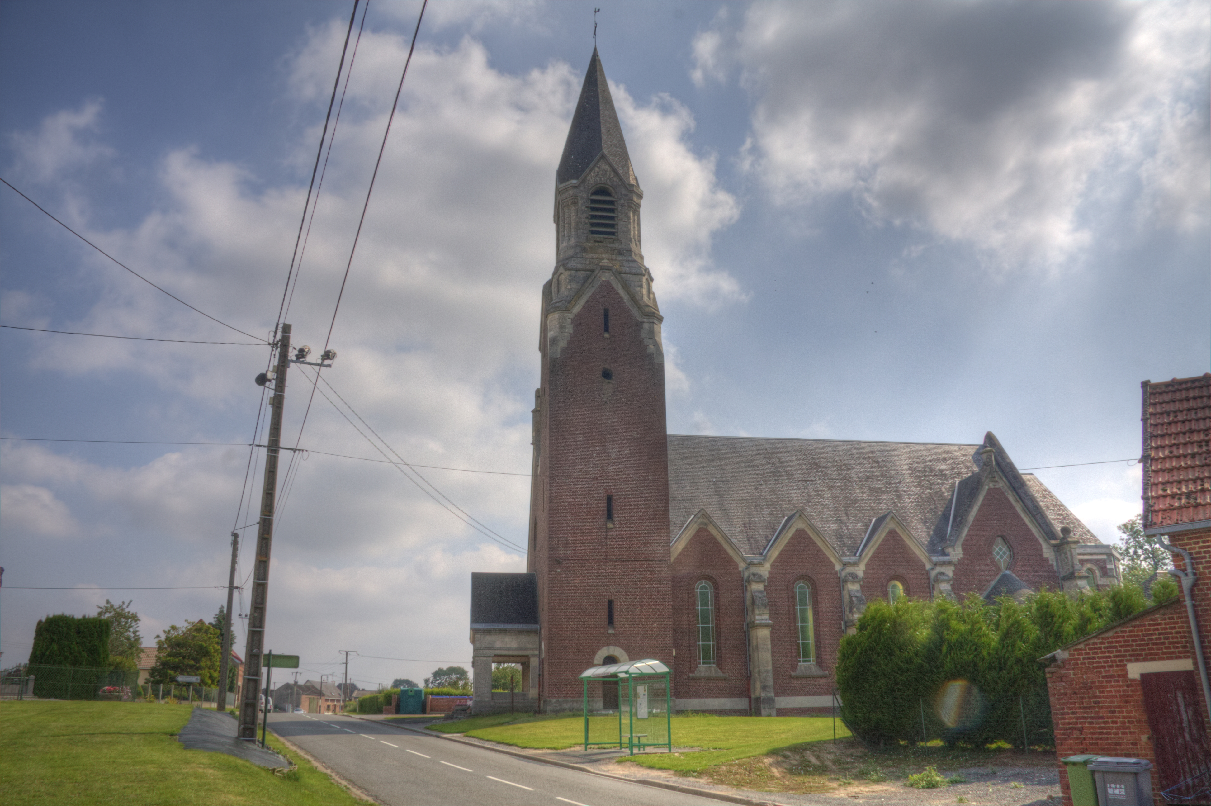 L'église de Villers-au-Flos